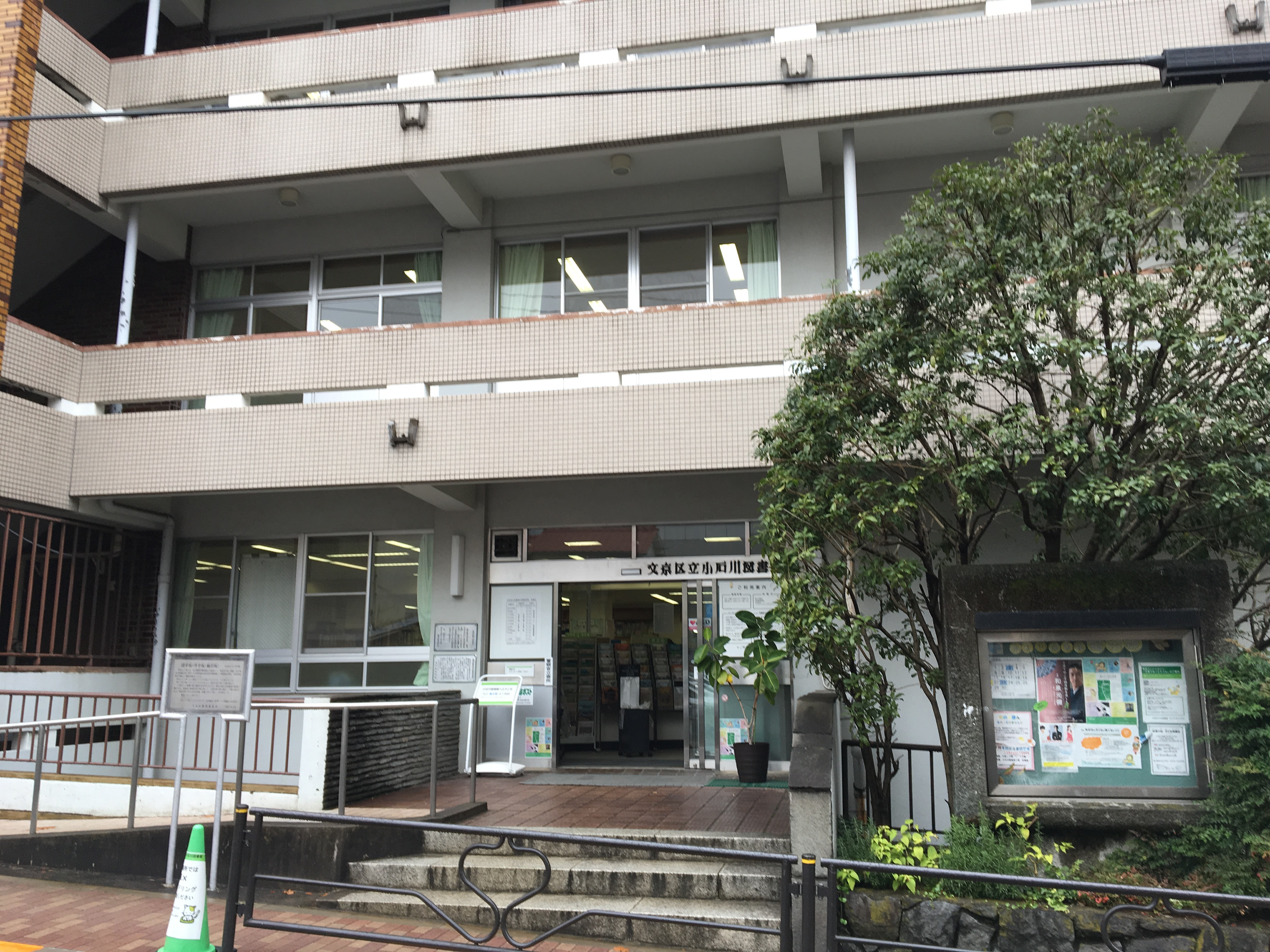 文京区立小石川図書館